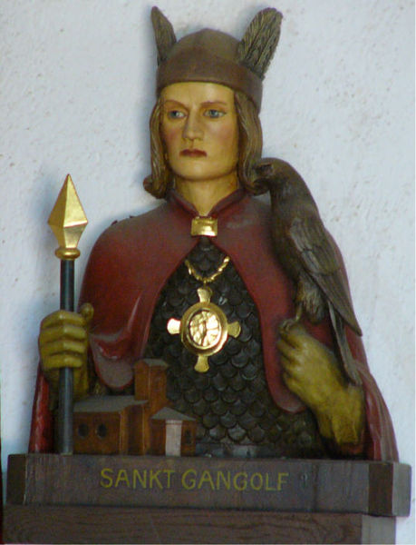 Aufnahme: eigenes Foto / urheberrechtlich frei gegeben für wikipedia)/ August 2004 (Original text: Diese Büste des Hl. Gangolf befindet sich in einer kleinen Kapelle auf dem Gipfelplateau des Berges Milseburg in der Rhön. Der Heilige hält in der rechten Hand eine Lanze und in der linken einen Falken - beides Attribute seiner adligen Abstammung. Links unten ist die Gangolfskapelle der Milseburg dargestellt.)